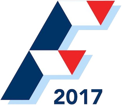 Logotipo oficial da campanha de François Fillon à presidência da França em 2017.